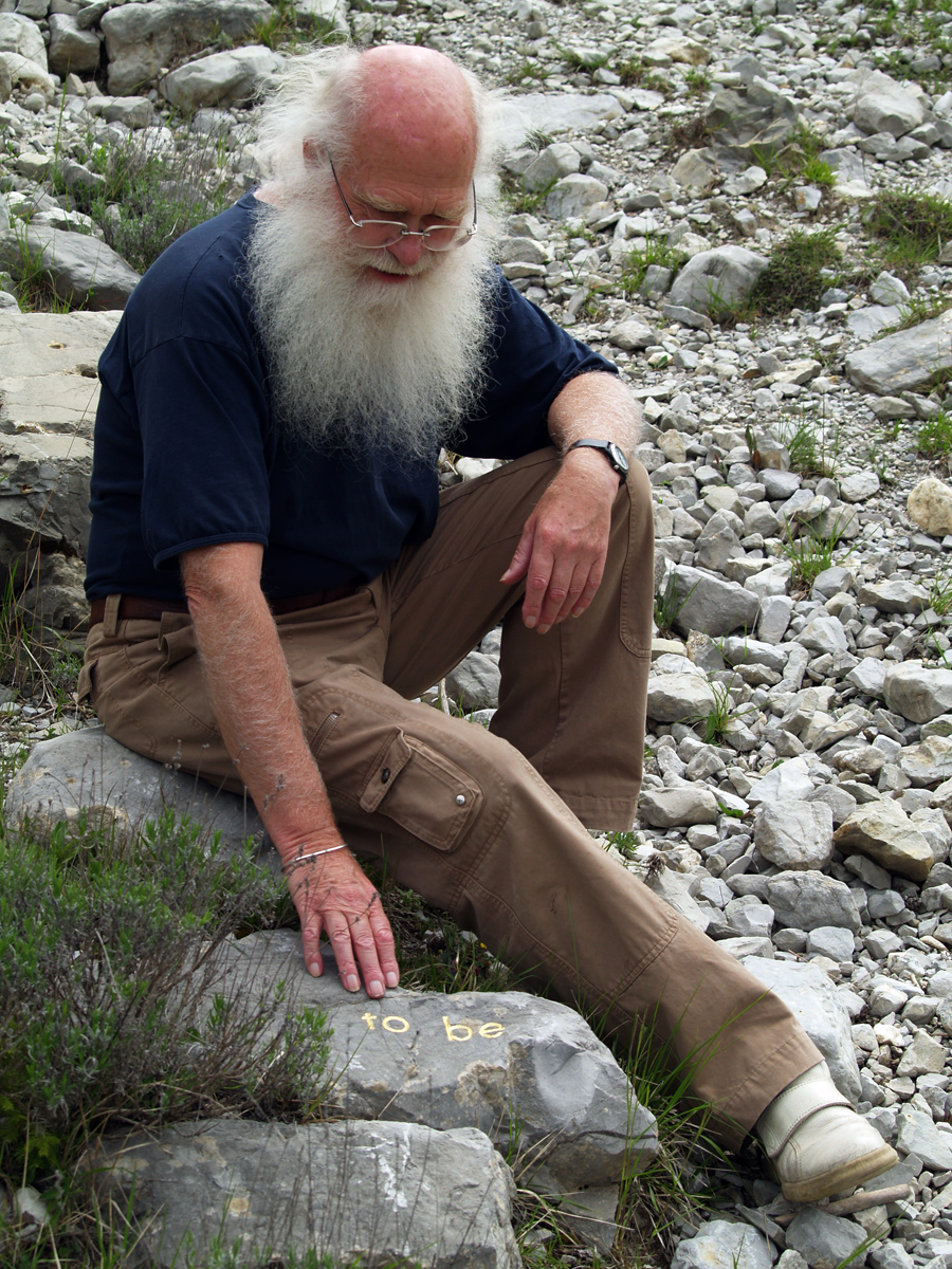 Projet traces.